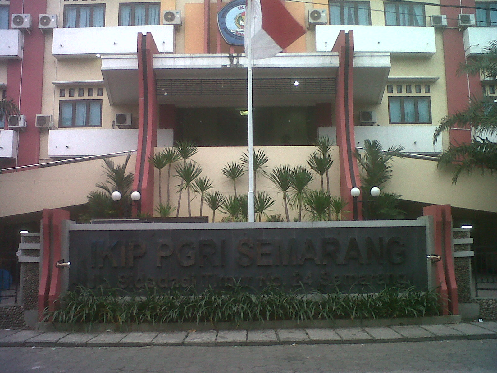 IKIP PGRI Semarang Jawa Tengah Indonesia, yang berada di tengah kota Semarang Jl.Dr.Cipto Semarang Indonesia